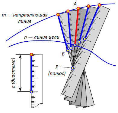 Вписываем отрезок AB между линиями m и n с помощью невсиса